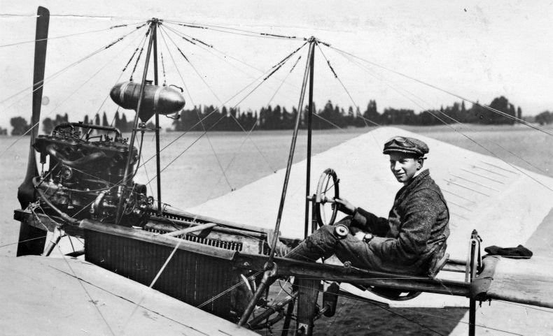 Nationaal Archief / Spaarnestad Photo, SFA001006308. A.H.G. Fokker (Anthony Fokker) in zijn Spin. Plaats en jaartal onbekend (omstreeks 1911). Dutch pioneer in aviaton Anthony Fokker sitting in "the Spider", his first aircraft. Approximately 1911. Collectie Spaarnestad Voor meer informatie en voor meer foto’s uit de collectie van Spaarnestad Photo, bezoek onze Beeldbank: U kunt ons helpen onze kennis van de fotocollecties te verrijken door tags en commentaren toe te voegen. Herkent u mensen of locaties of heeft u een bijzonder verhaal te vertellen bij één van de foto’s, laat dan een reactie achter (als u ingelogd bent bij Flickr) of stuur een mailtje naar: You can help us gain more knowledge on the content of our collection by simply adding a comment with information. If you do not wish to log in, you can write an e-mail to